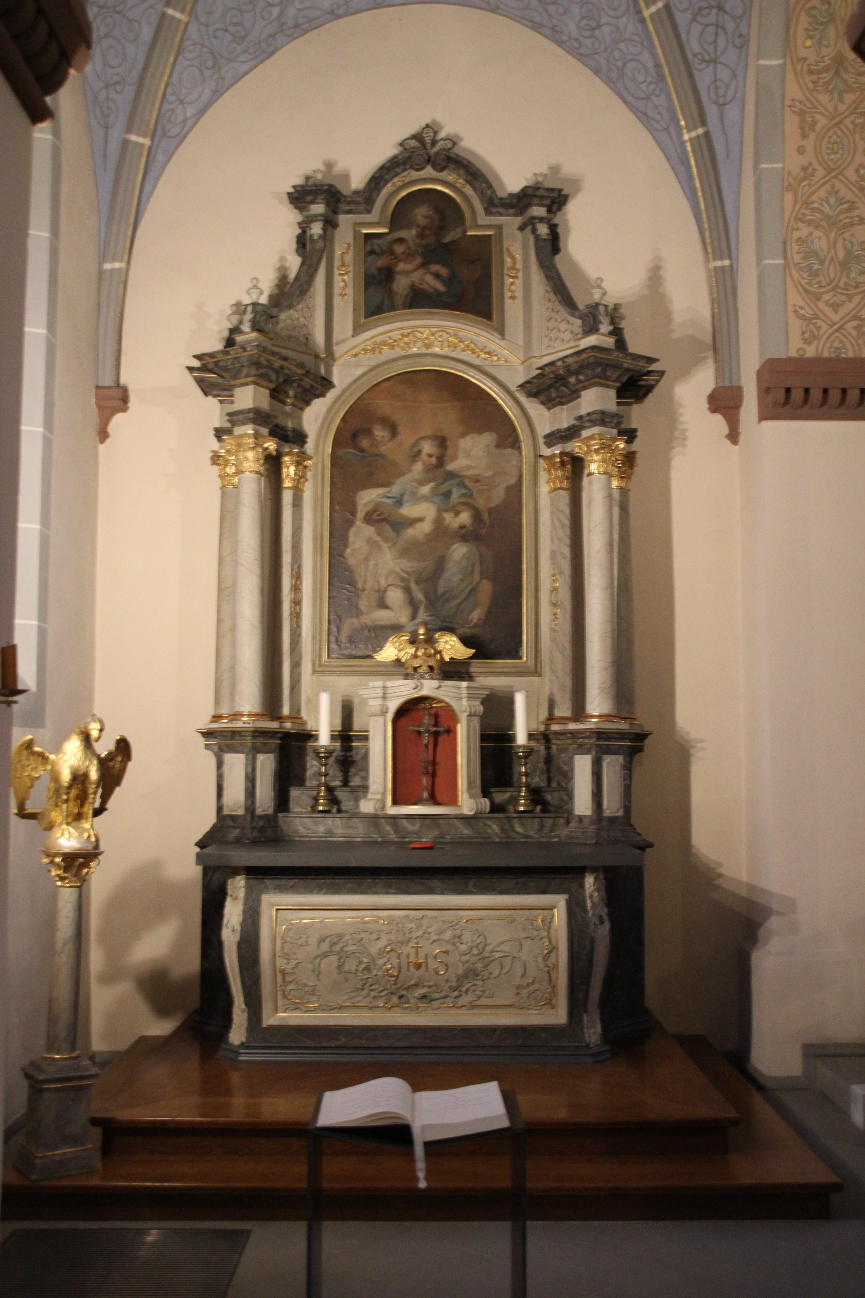 Linker Seitenaltar in der Kirche St. Cyriakus in Düren-Niederau.